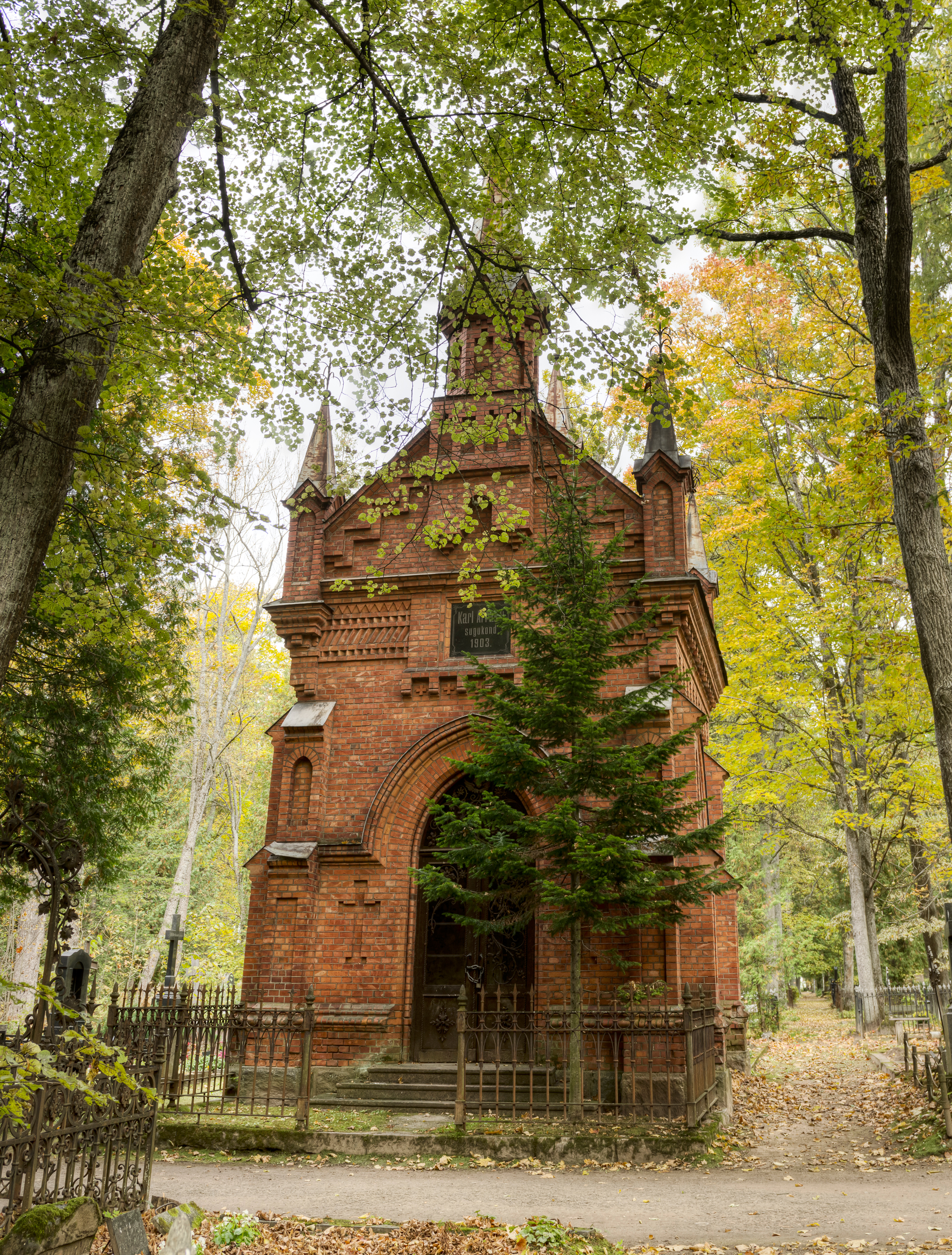 Arraku perekonna kabel Tartu Raadi kalmistul. Panoraamfoto kolmest kaadrist